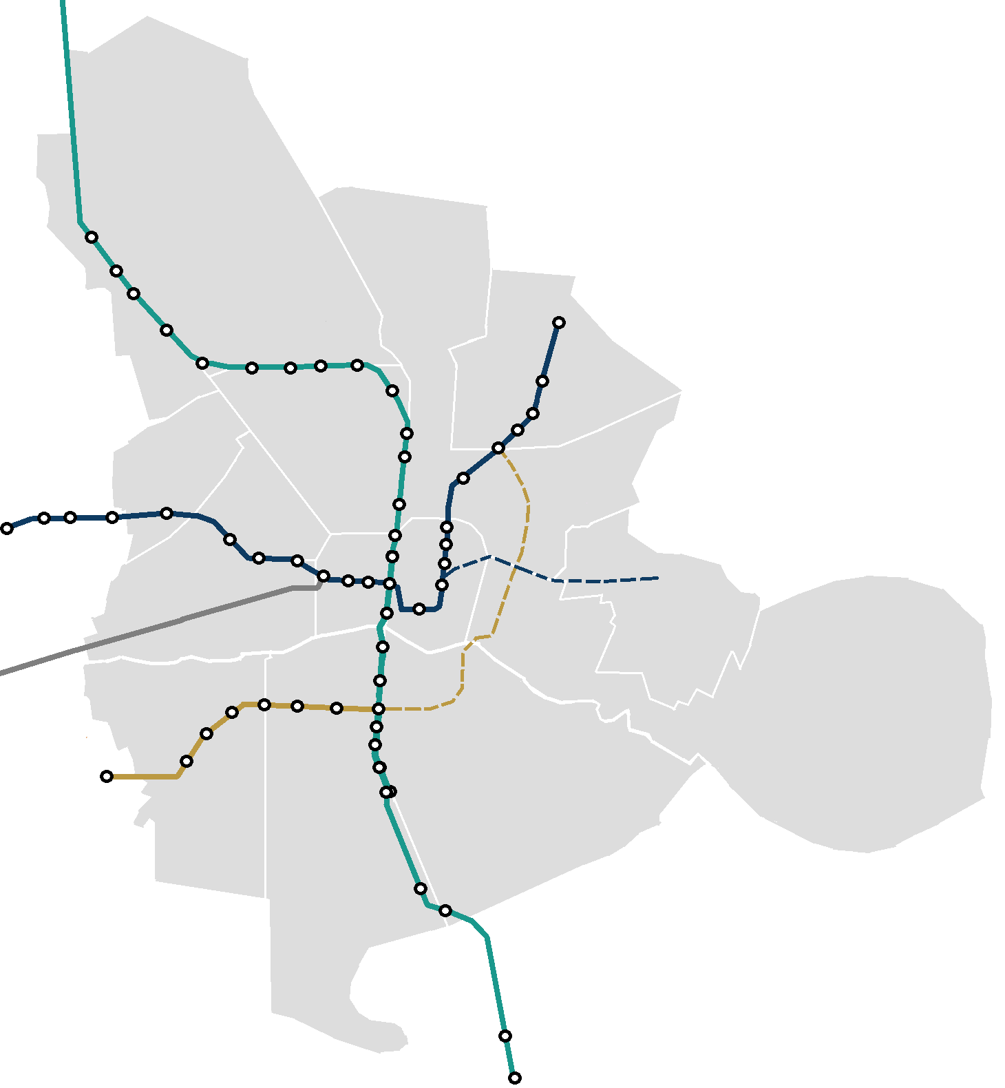 نقشه جغرافیایی خط قطار شهری اصفهان